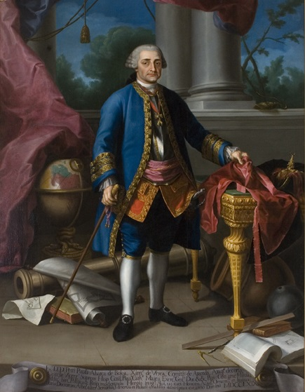 Retrato del aristócrata y político español Pedro Pablo Abarca de Bolea (1719-1798), que fue el X conde de Aranda y también presidente del Consejo de Castilla y secretario de Estado de Carlos IV.